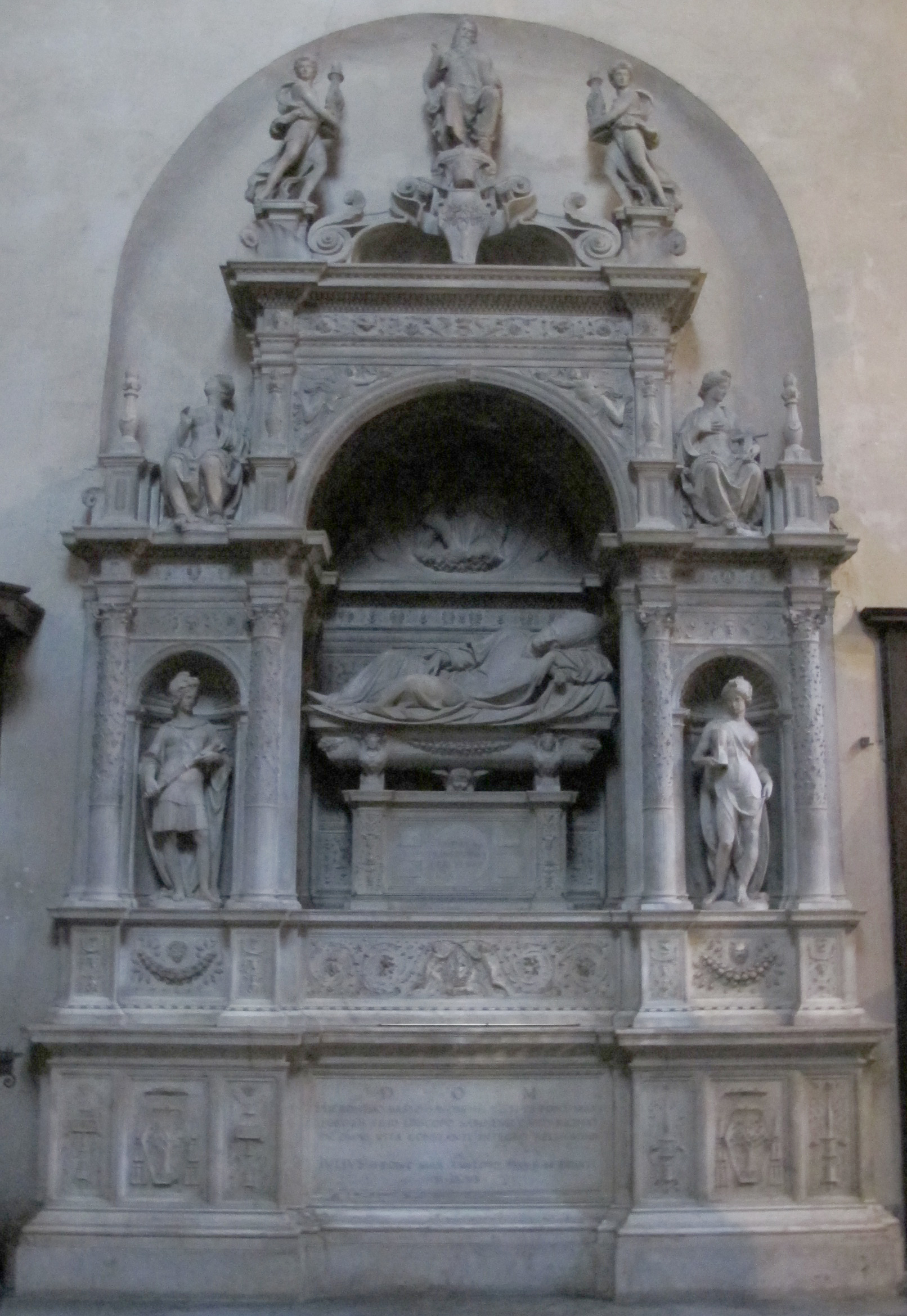 Sansovino, monumento funebre di girolamo basso della rovere